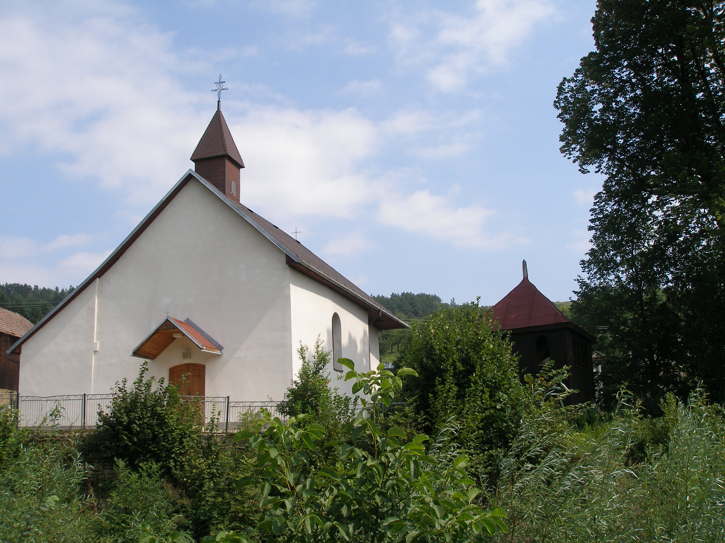 Šarišská obec Štefanovce